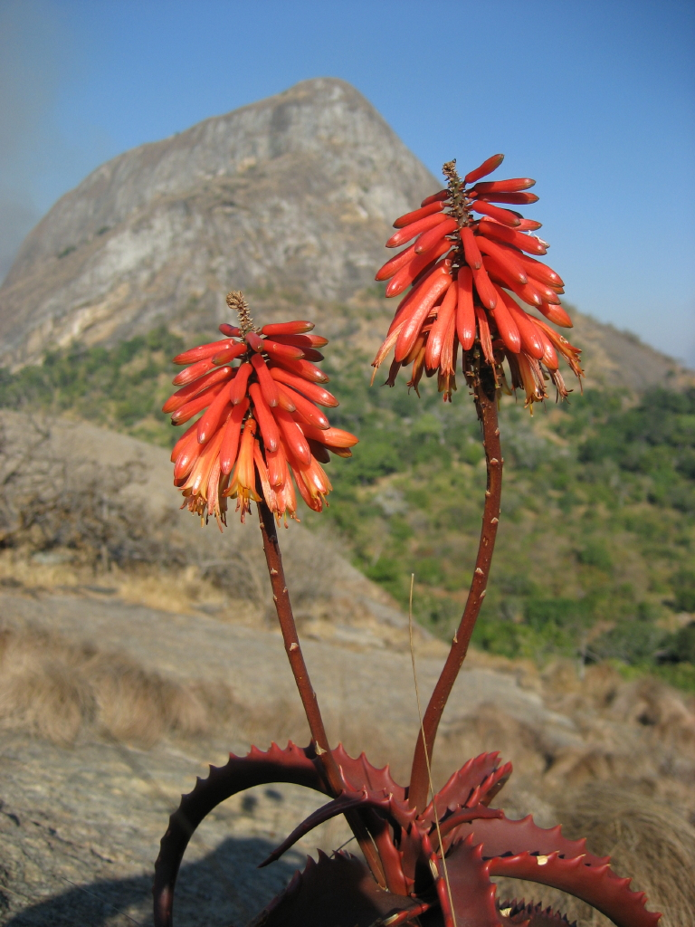 Aloe cameronii